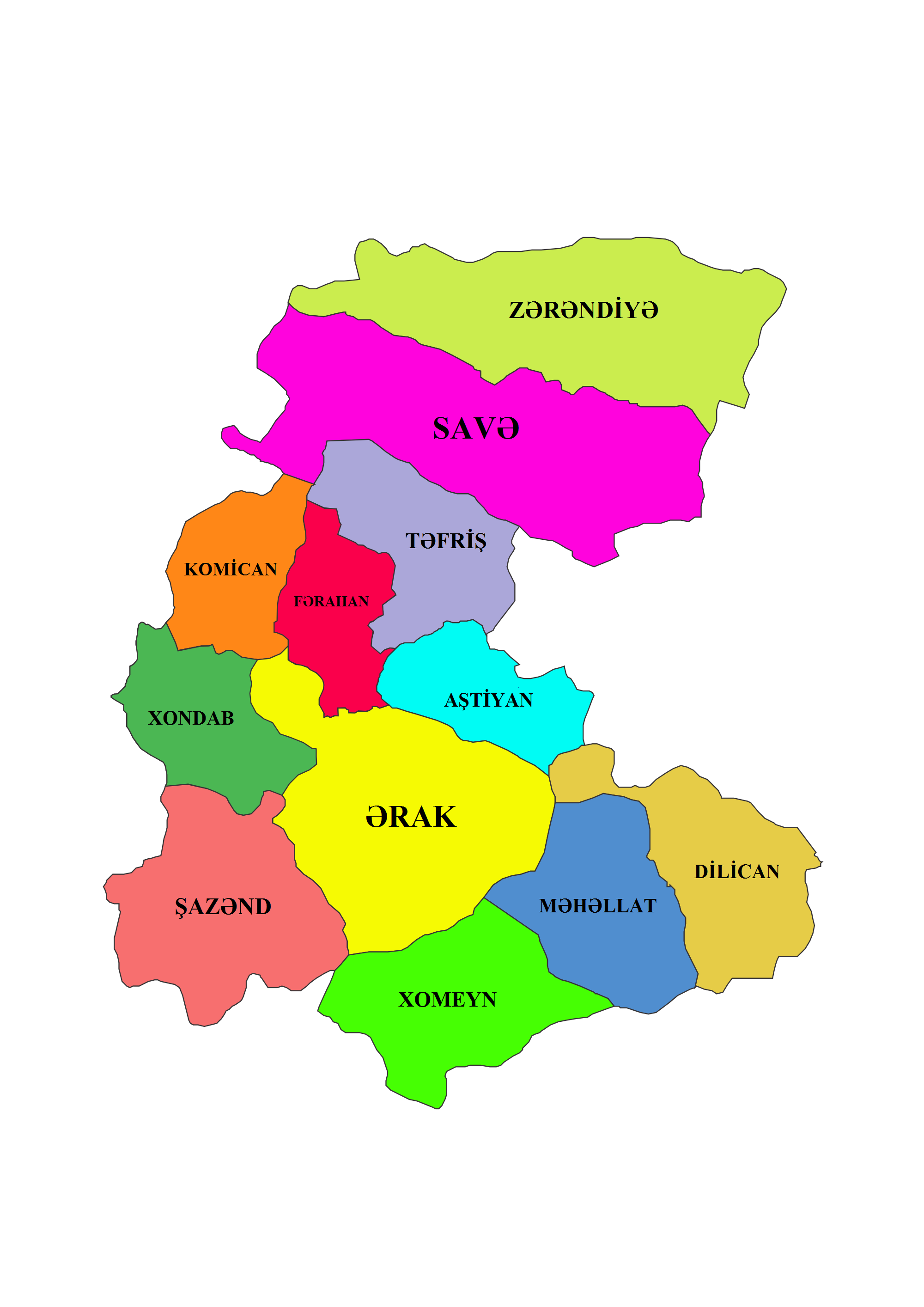 Mərkəzi ostanının şəhristanları (2011–ci il siyahıyaalınması yekunlarına əsasən).